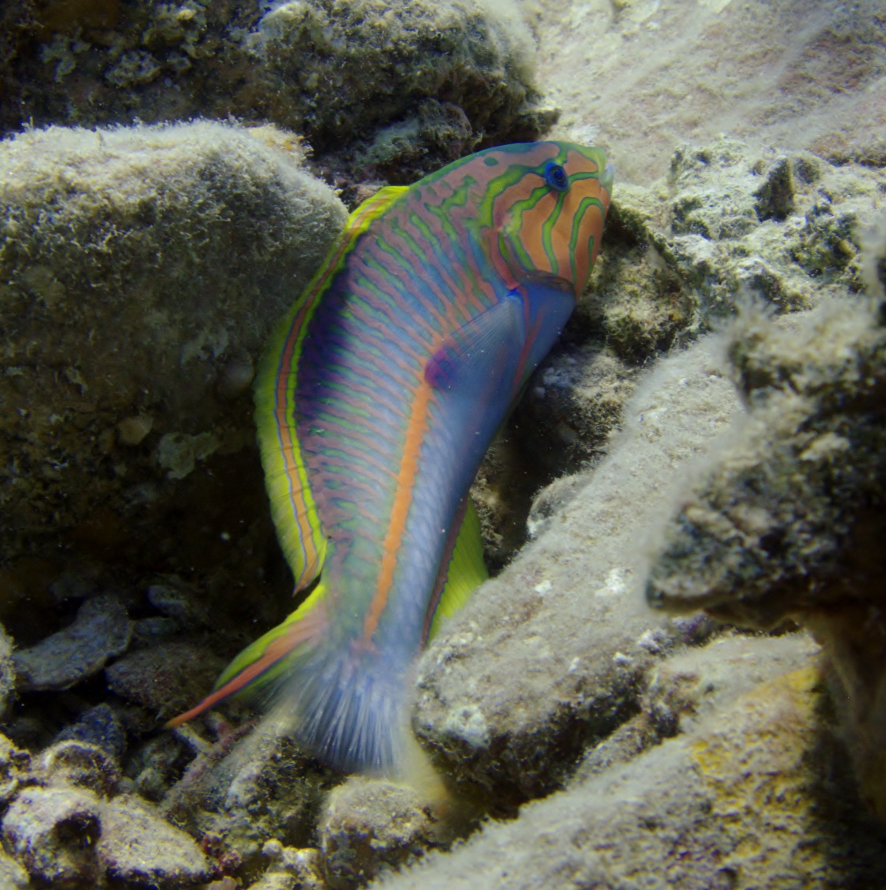 Thalassoma rueppellii, en Dhahab Janub Sina', Egipto, 2013